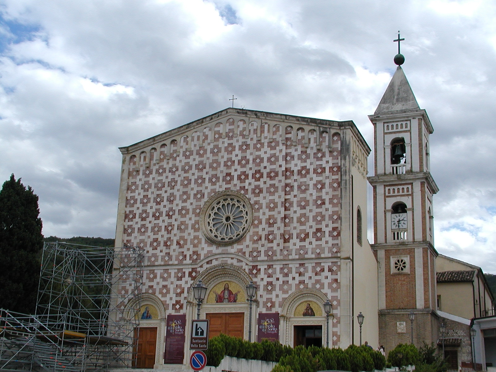 Die Kirche in dem der Schleier gezeigt wird